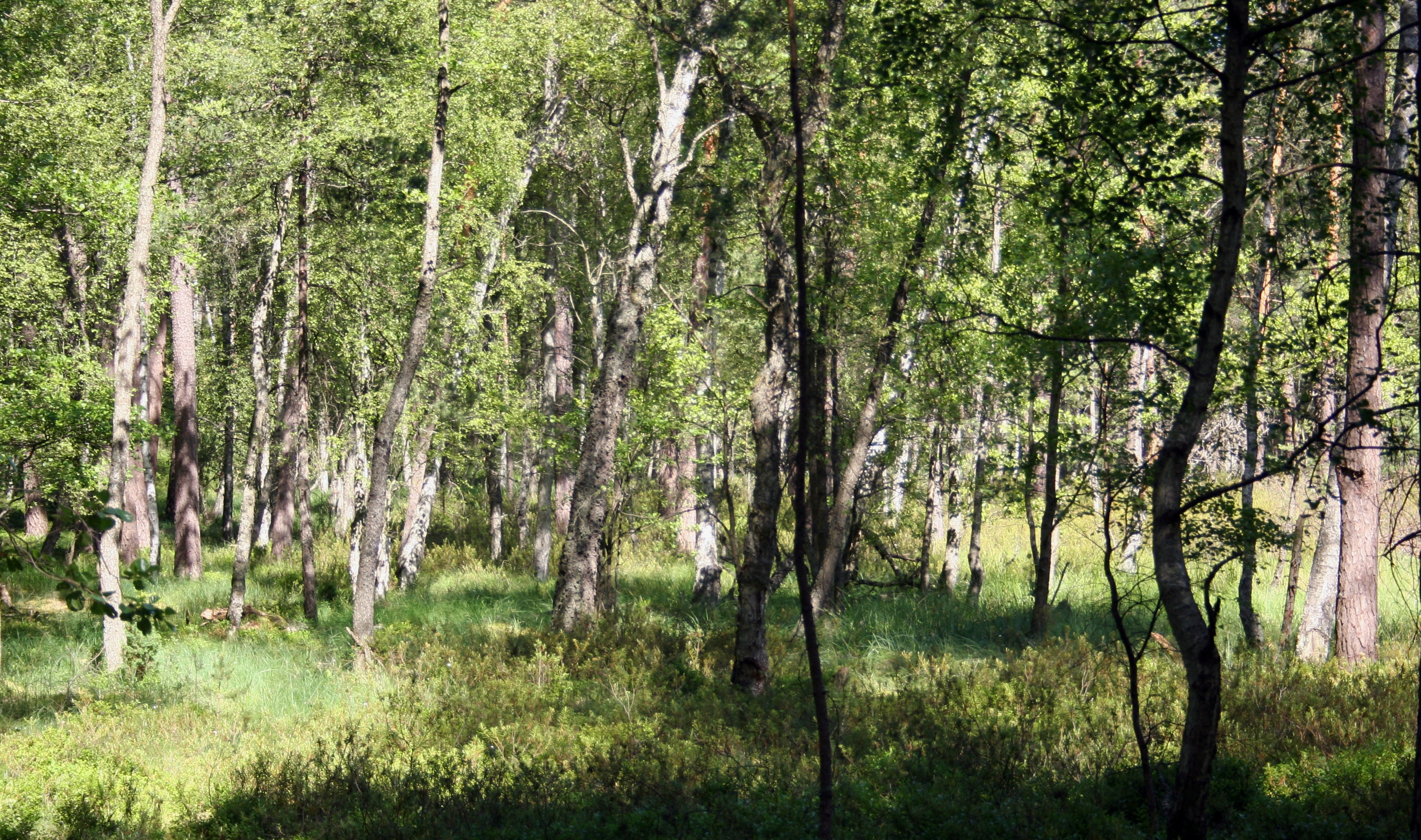 Fragment zbiorowiska brzezina bagienna w pobliżu jeziorka "Kacze Oko" w Parku Narodowym Bory Tucholskie